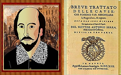 «Краткий трактат о средствах снабдить в изобилии золотом и серебром королевства, которые их не добывают»